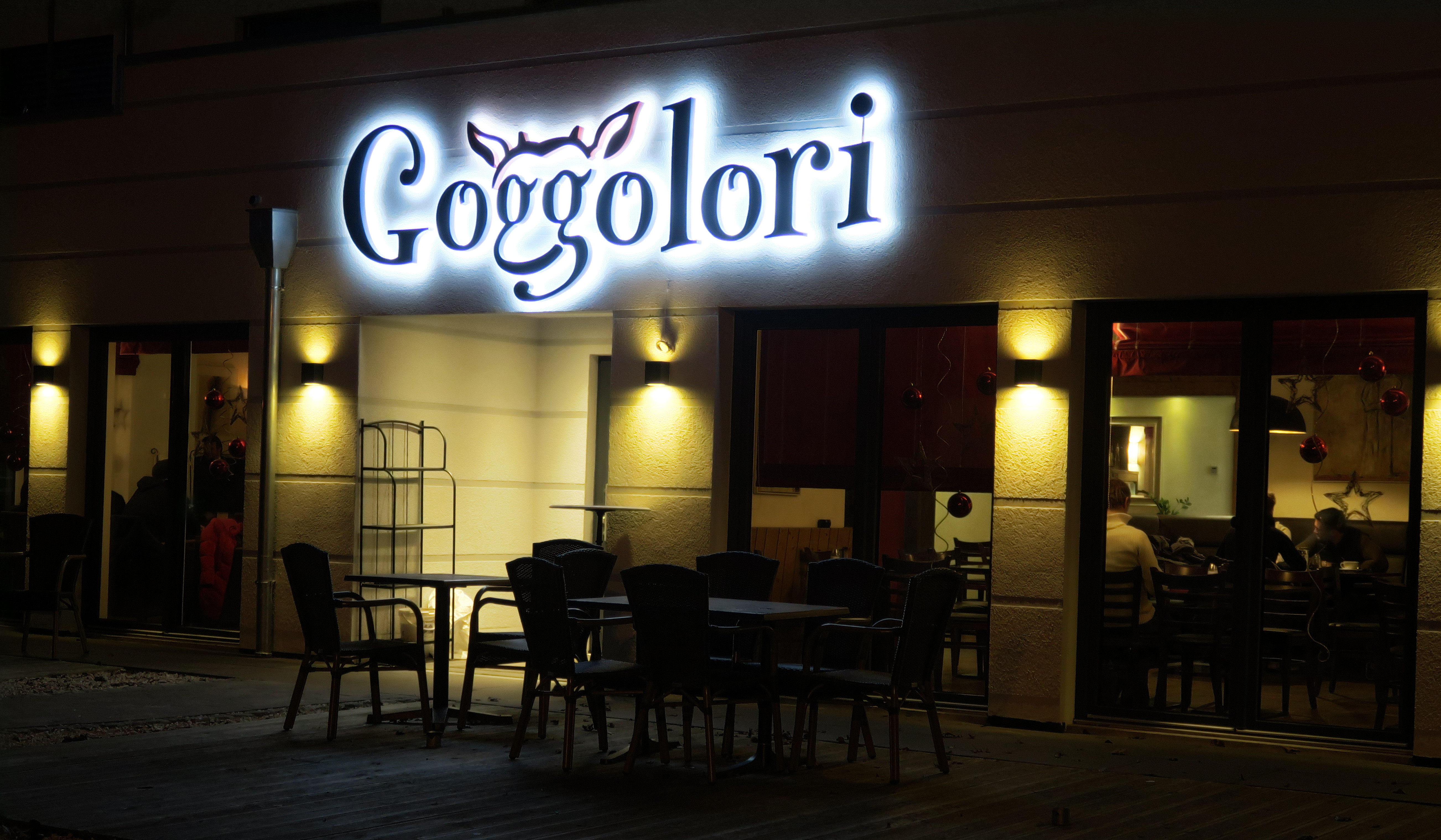 Deutschland, Bayern, Landkreis Cham, Bad Kötzting, Restaurant Goggolori